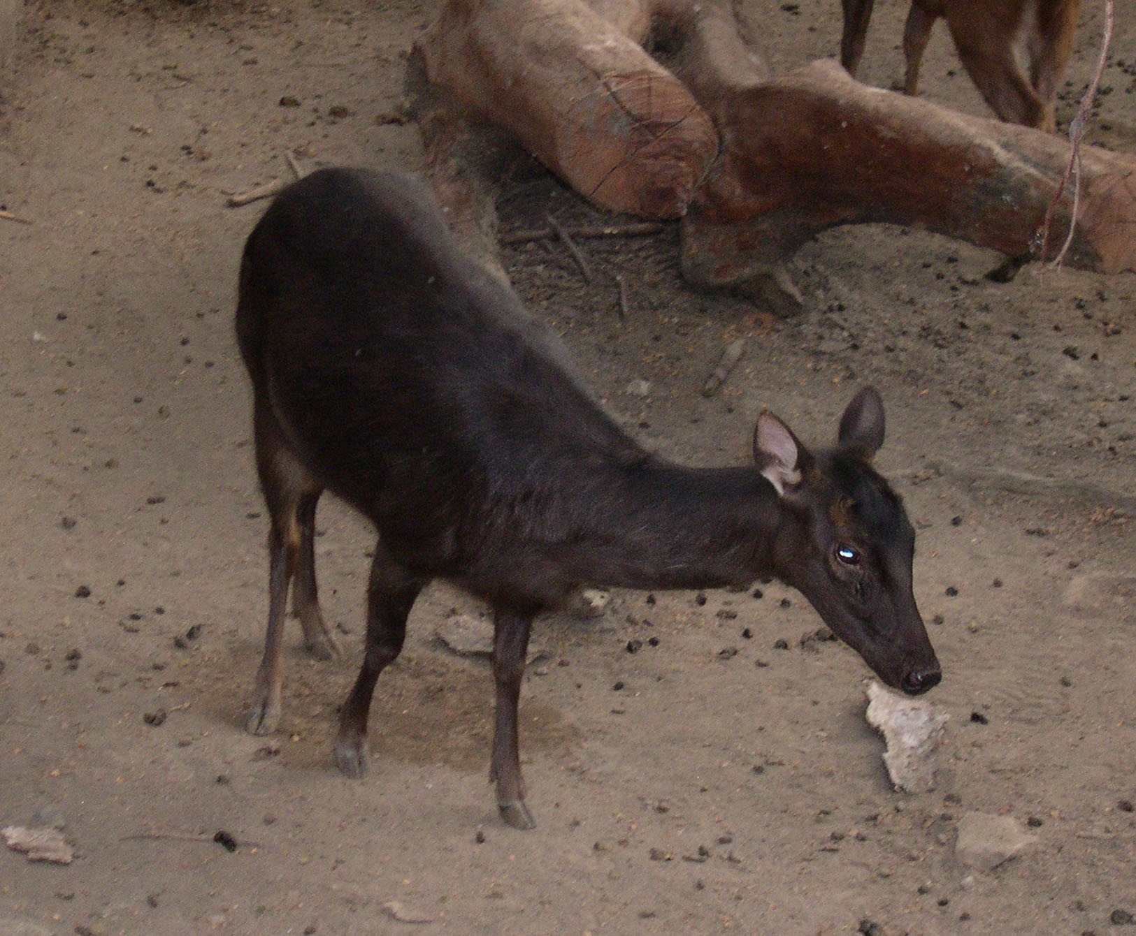 Philippine Deer (Cervus Mariannus) in Manila, Philippines